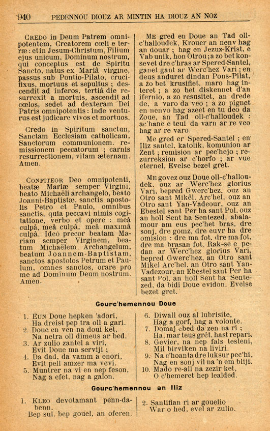 Perrot. Bue ar Zent. p940